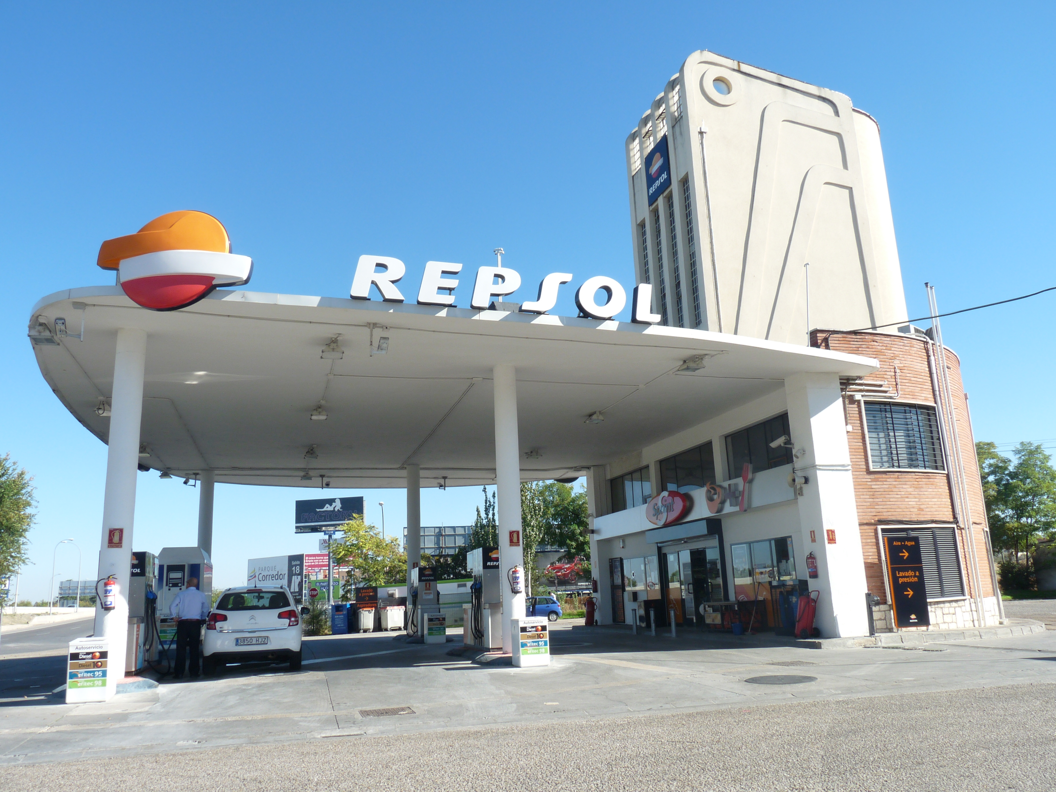 Gasolinera en el número 288 de la avenida de Aragón, Madrid.